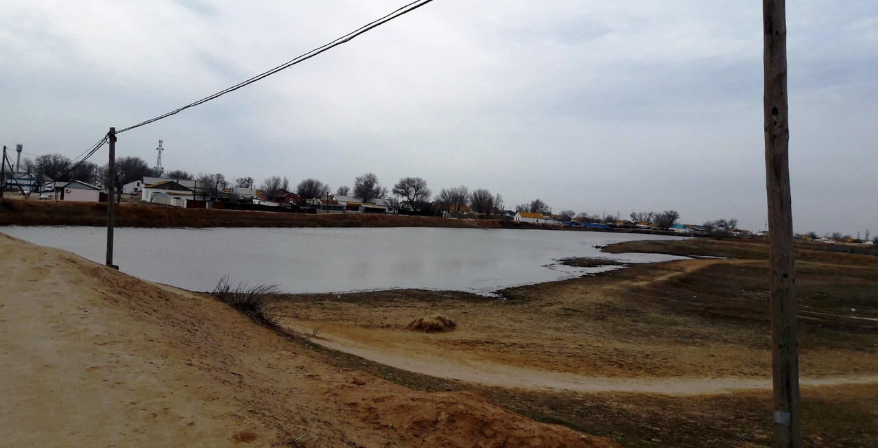 Қазақша (кирил): с.Хиуаз